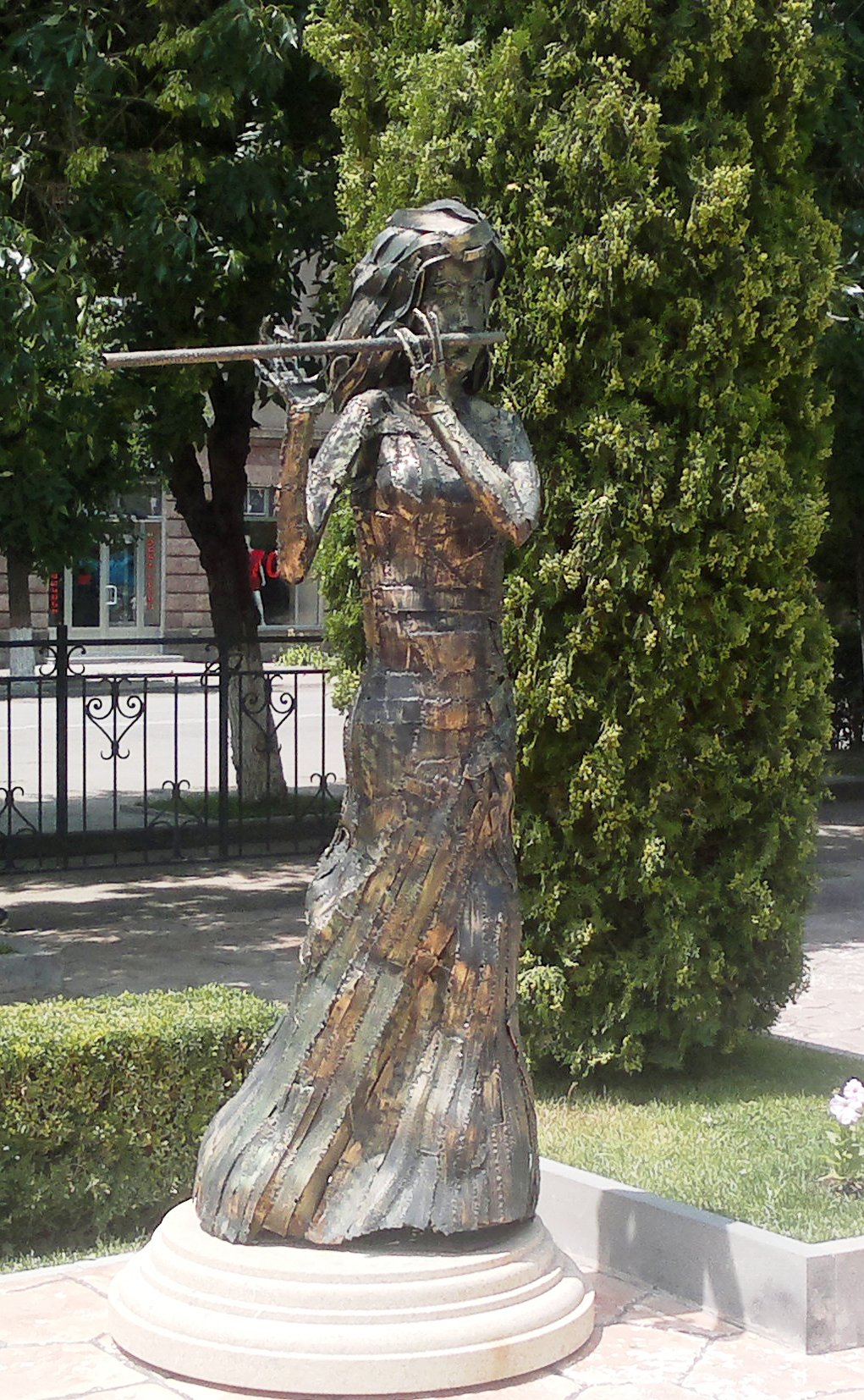 Երաժշտի արձան Իսուզի պուրակում 03, Cropped